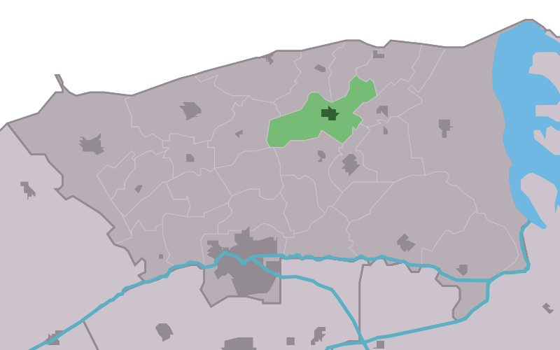 Kaartsje fan himrik fan Easternijtsjerk